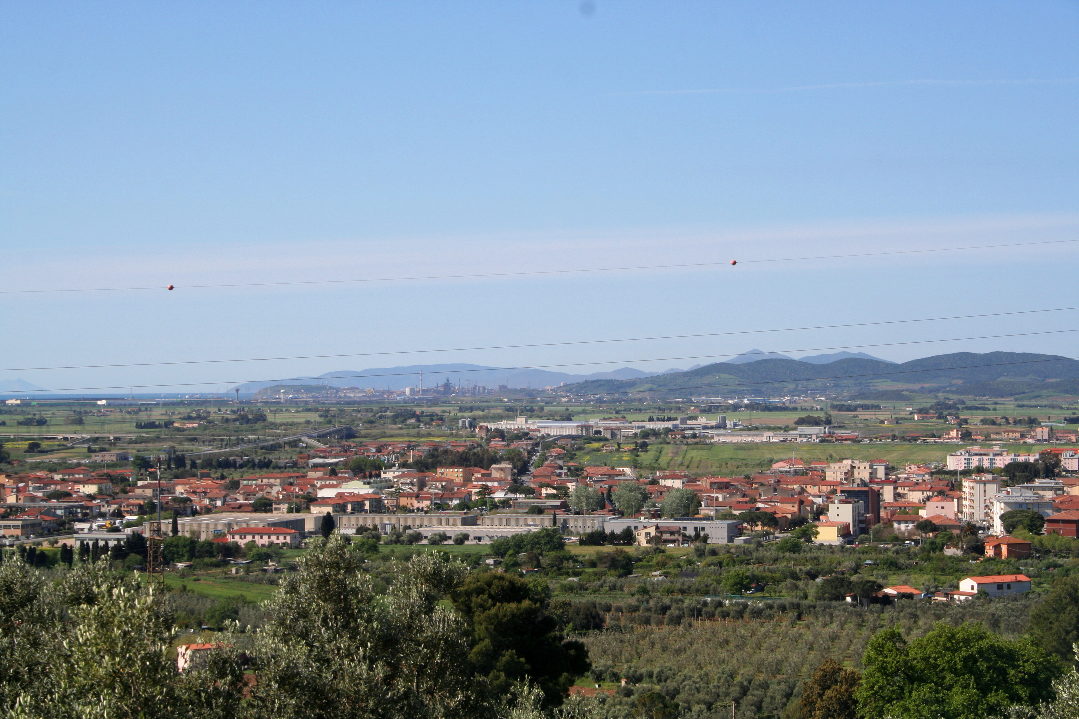 Panorama di Venturina, frazione di Campiglia Marittima